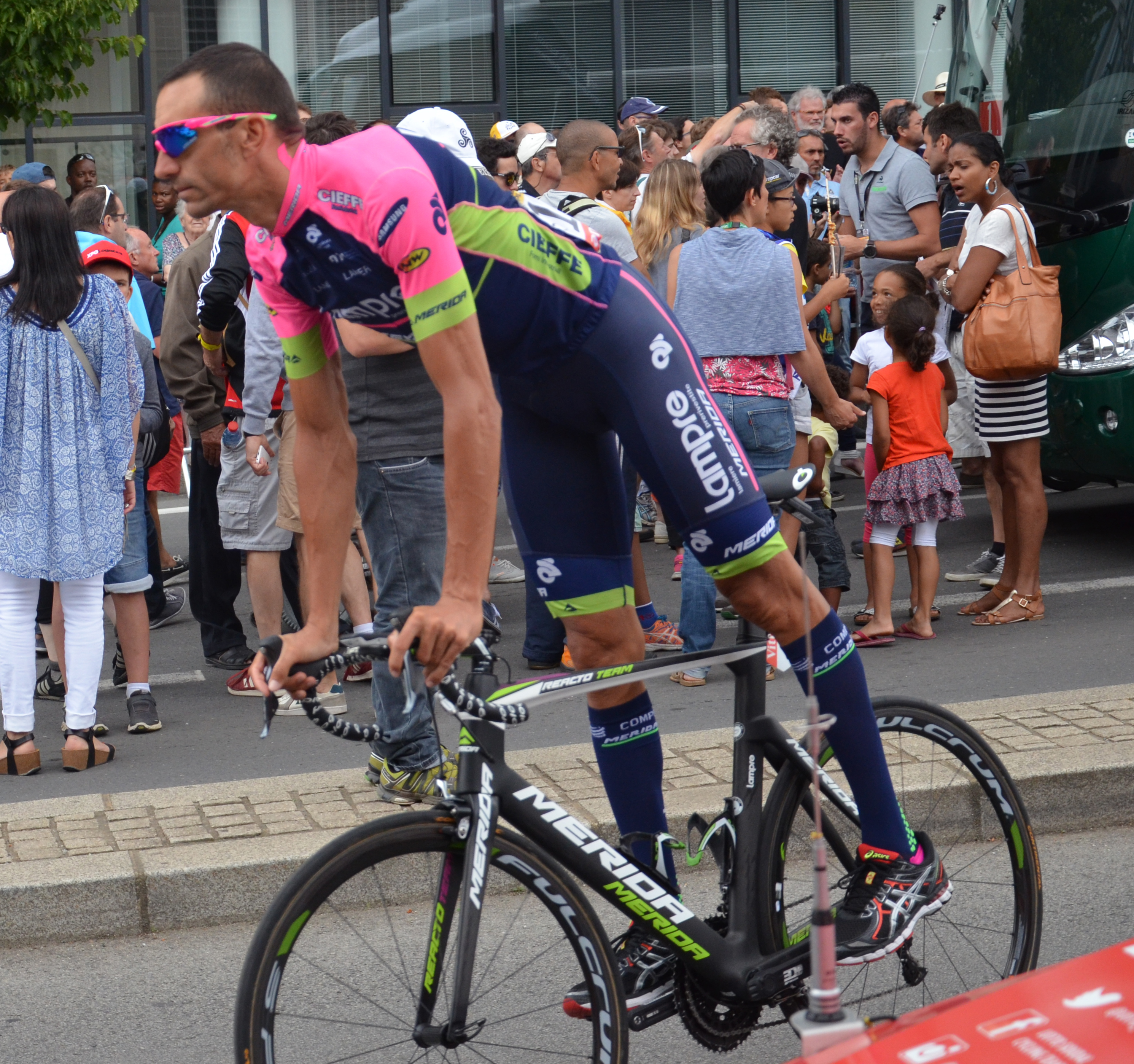 Ruben Plaza au départ de la 8ème étape du Tour de France 2015, à Rennes.